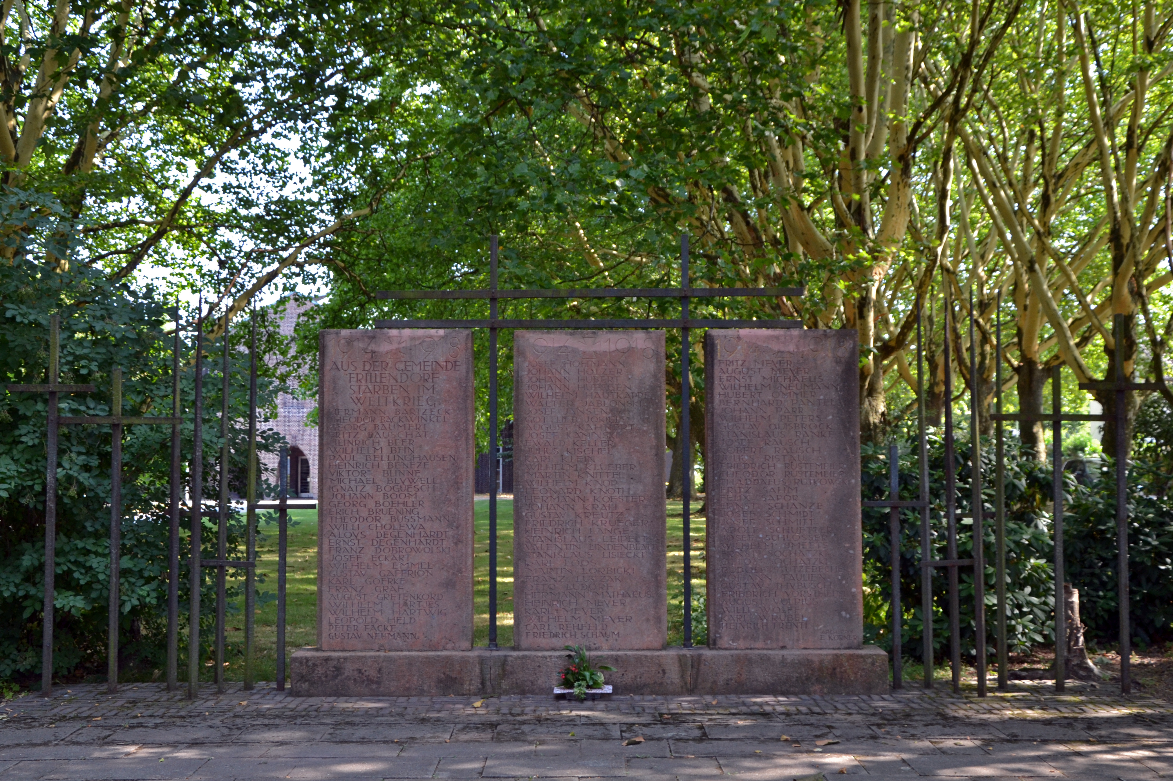 Ehrenmal zur Erinnerung an die Gefallenen des Ersten Weltkriegs in Essen-Frillendorf, Nordrhein-Westfalen